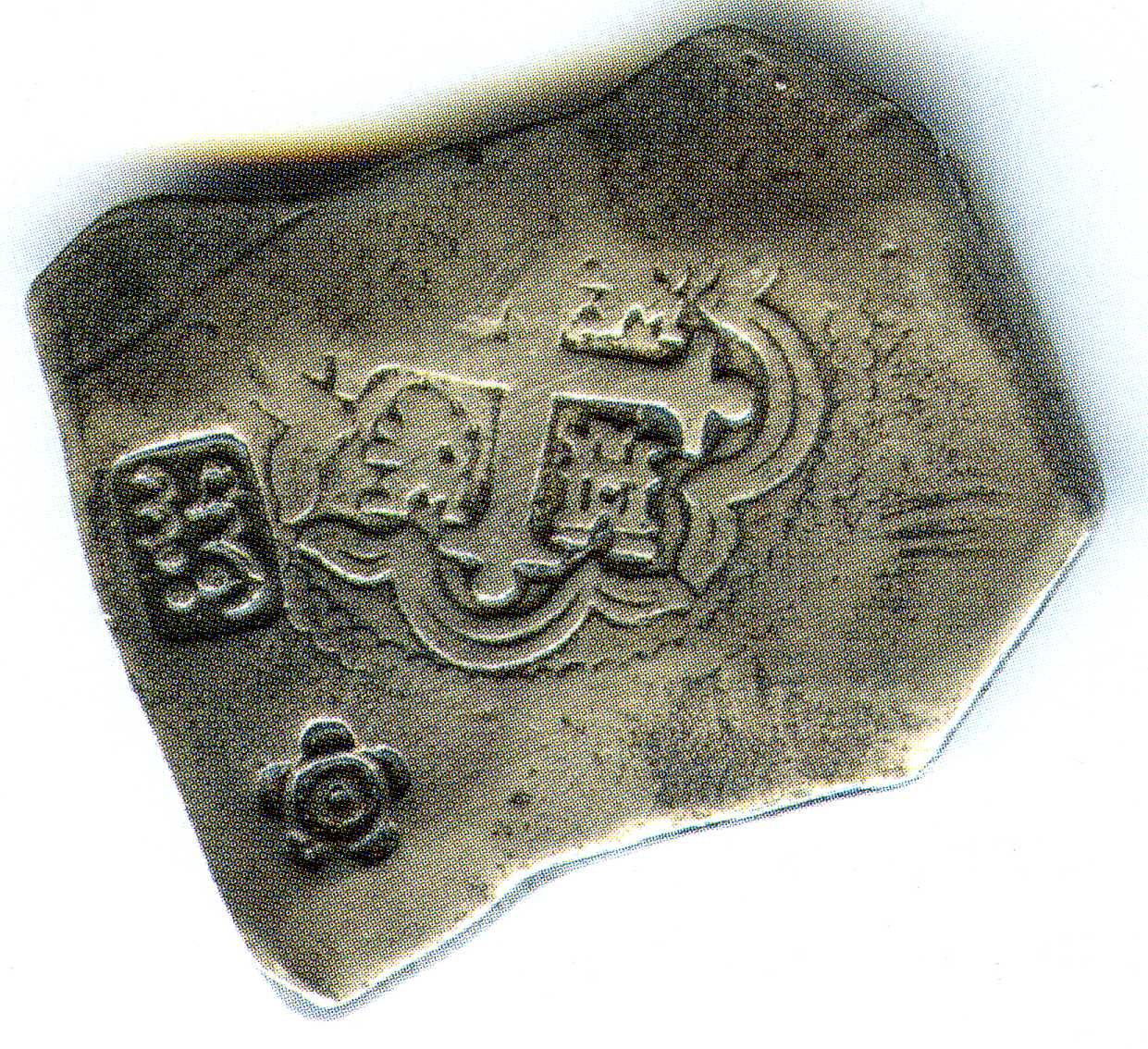 Moneda con contramarca estampada en Soumanap